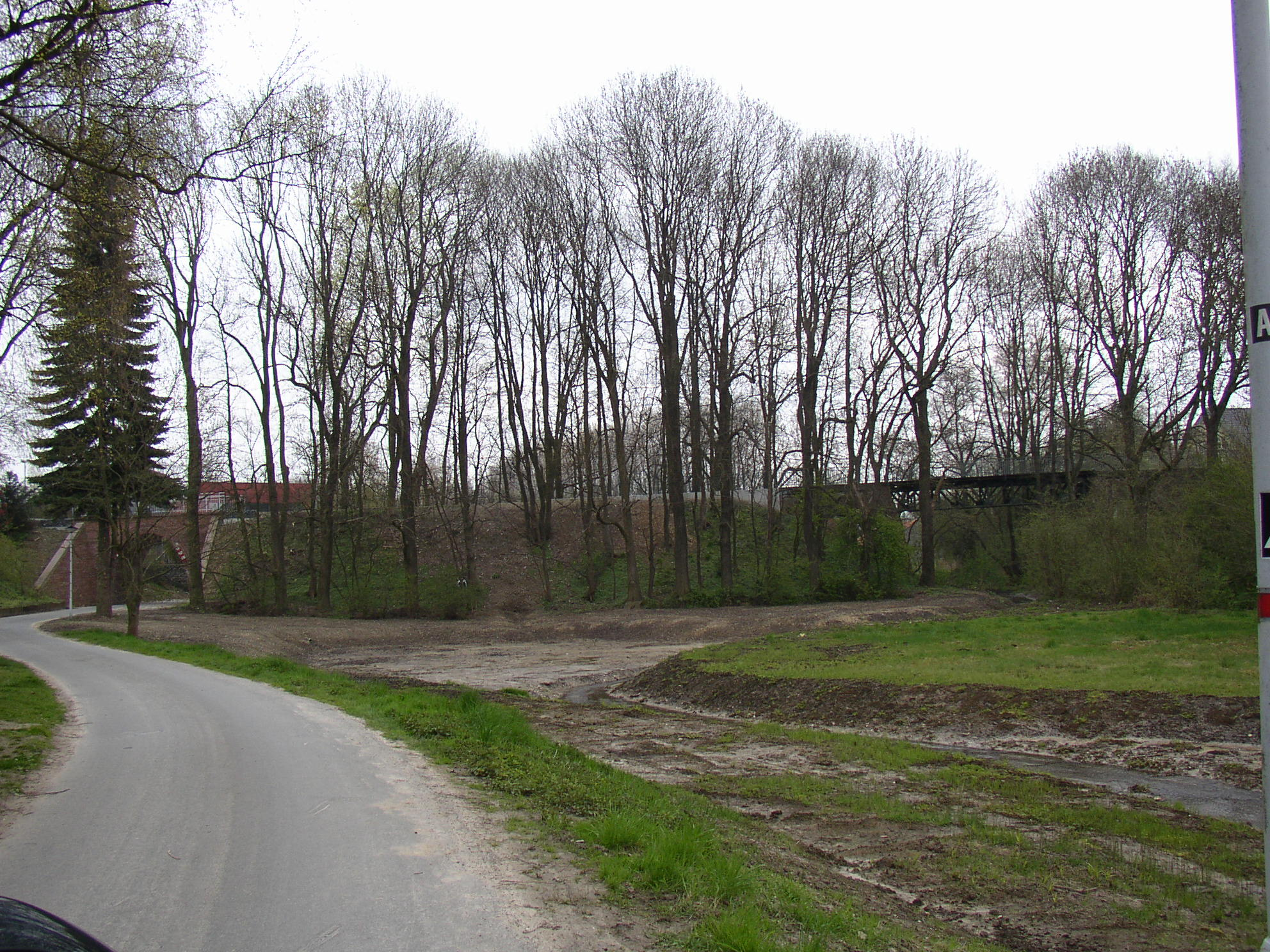 Werther (Westf) - Talbrücke der ehemaligen Kleinbahnstrecke This is a photograph of an architectural monument.